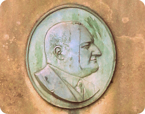 Станислав Невядомский - польский композитор.